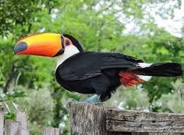 Foto de José Carlos Garcia